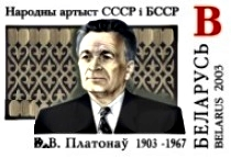 Марка Беларуси 2003 года. Народный артист СССР и БССР Борис Викторович Платонов. Художник - Максим Свистунов.